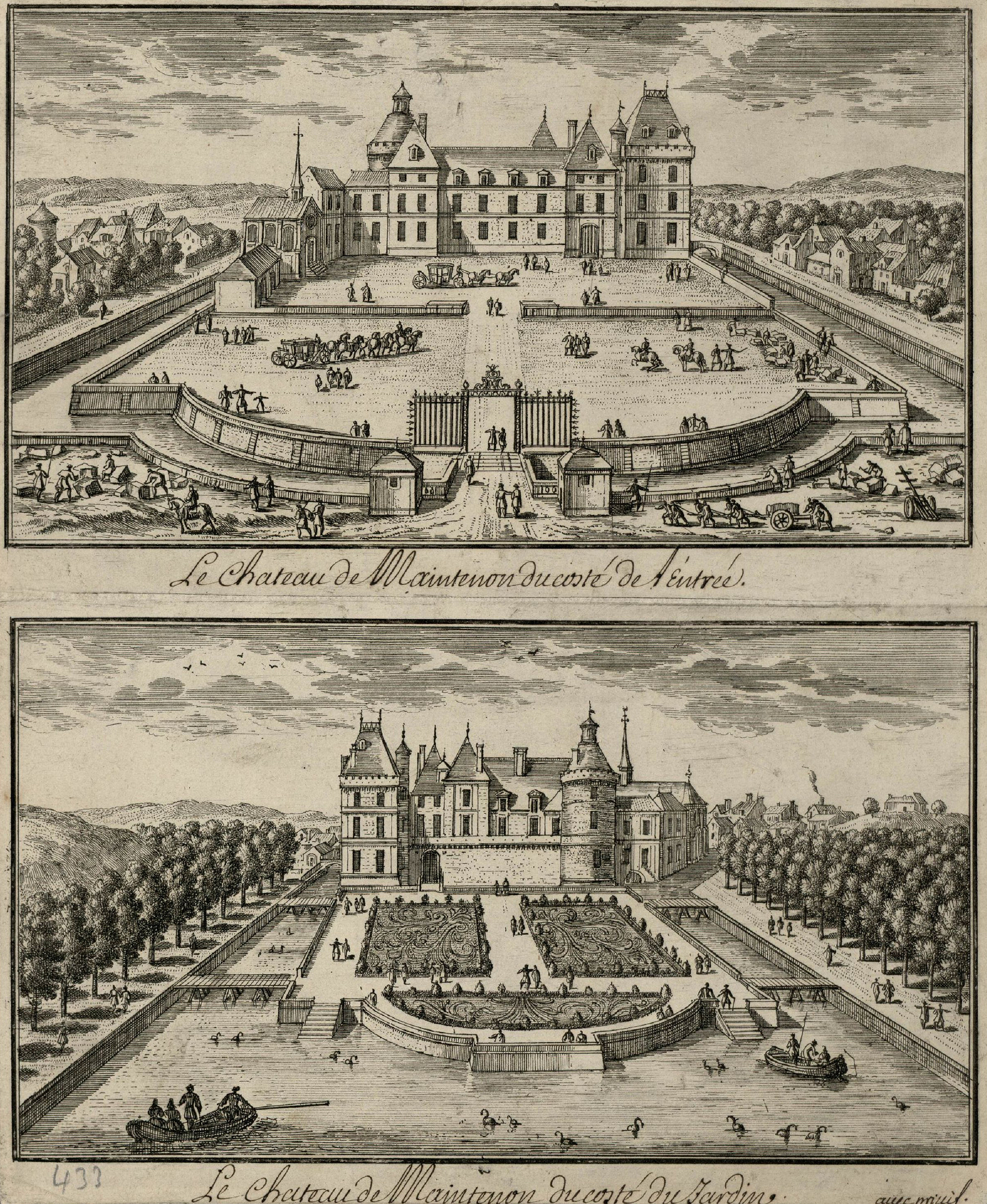 Alter Stich mit zwei Ansichten des Schlosses Maintenon